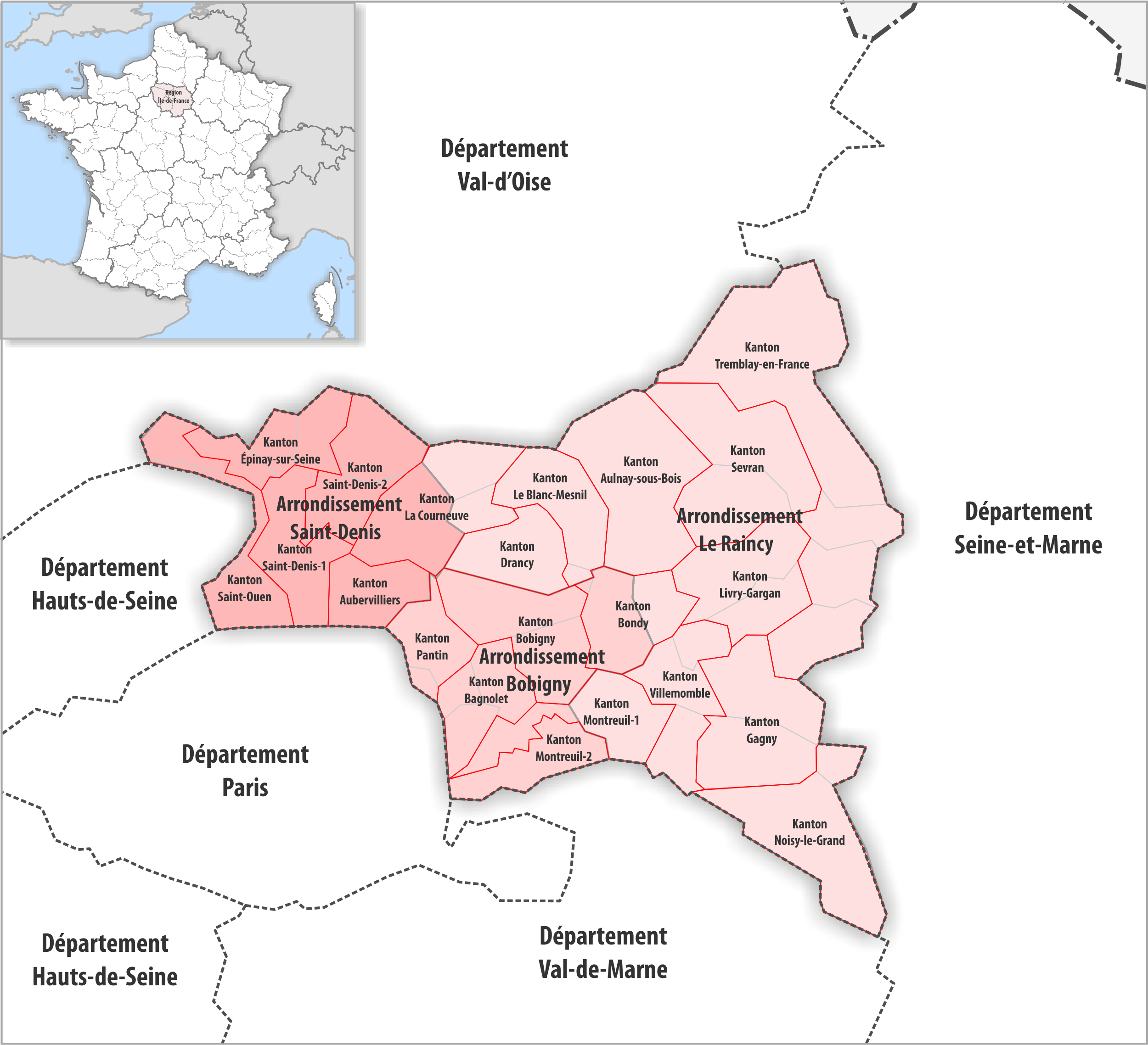 Gemeinden, Kantone und Arrondissemente im Departement Seine-Saint-Denis